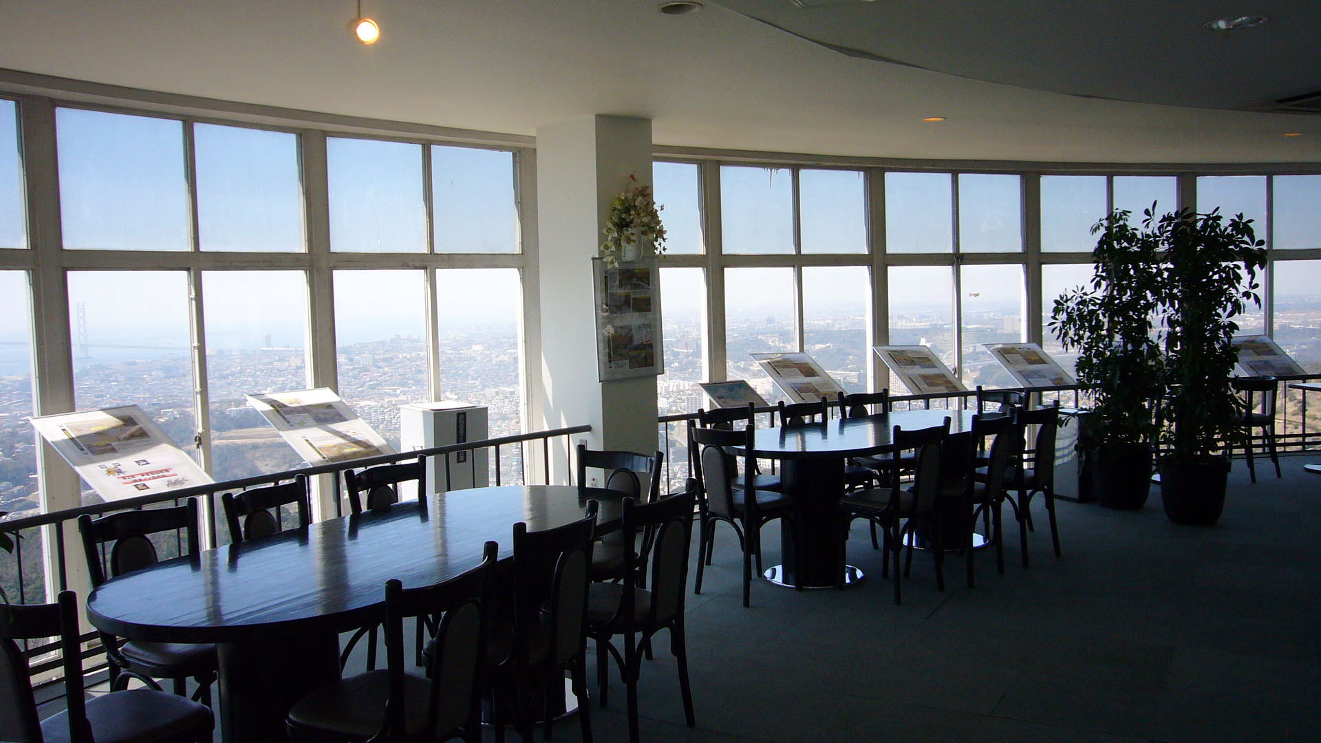 Sumaura Sanjo Amusement Park in Kobe, Japan